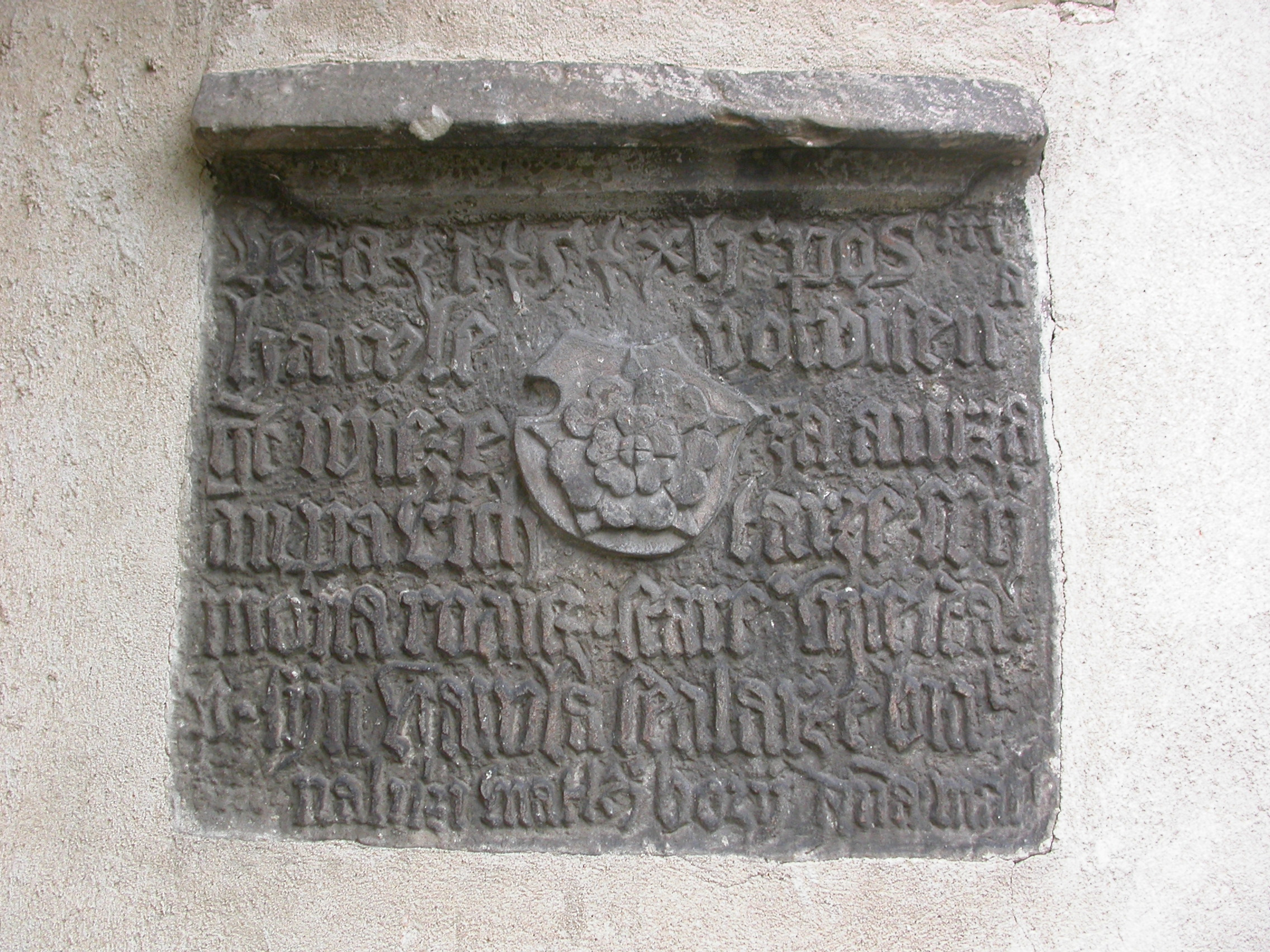 Deska zachicující přesný rok výstavby věže kostela sv. Jakuba v Libiši